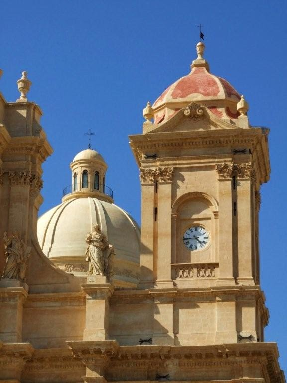 Barocco di Noto (Sicilia)